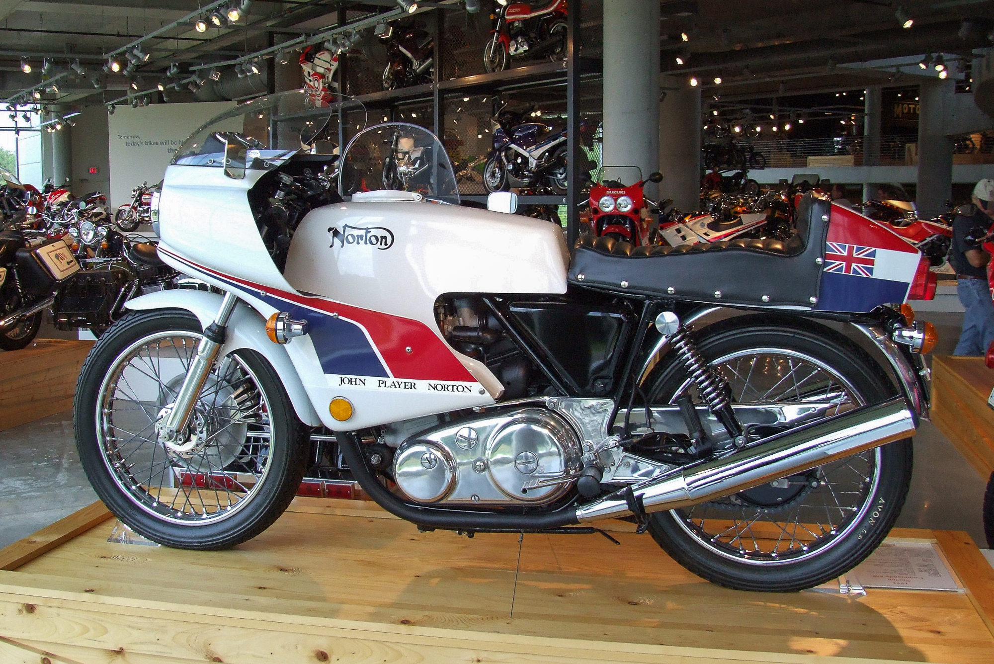 Norton Commando 850 (1974) im Barber Vintage Motorsports Museum, Birmingham Alabama USA